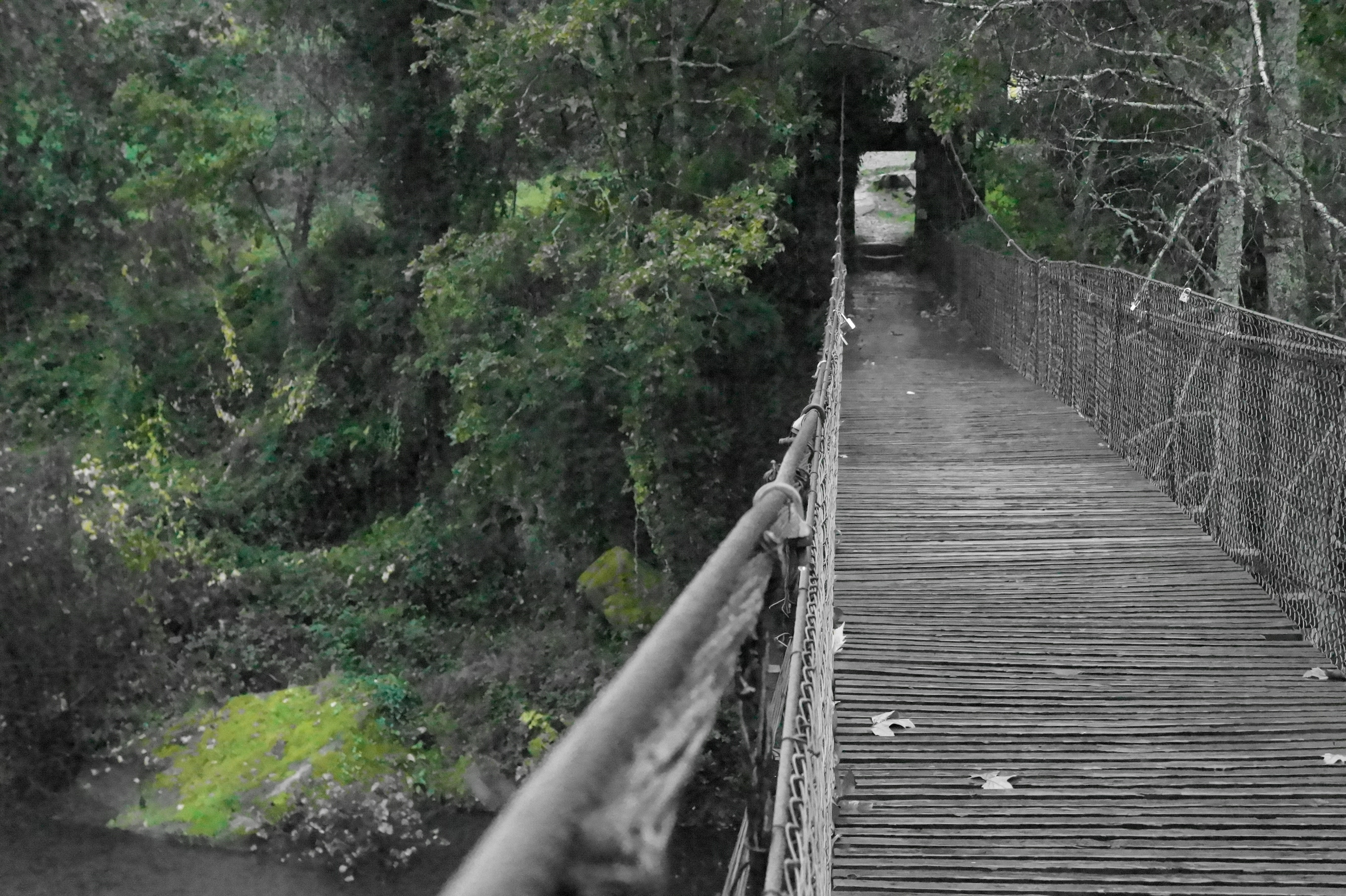 ponte pênsil dobre o rio Tâmega